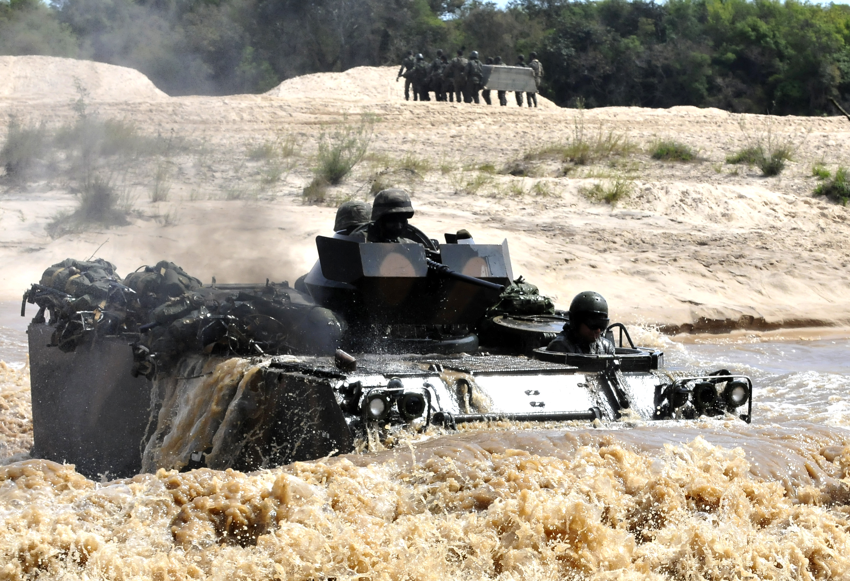 Fotos: Jorge Cardoso